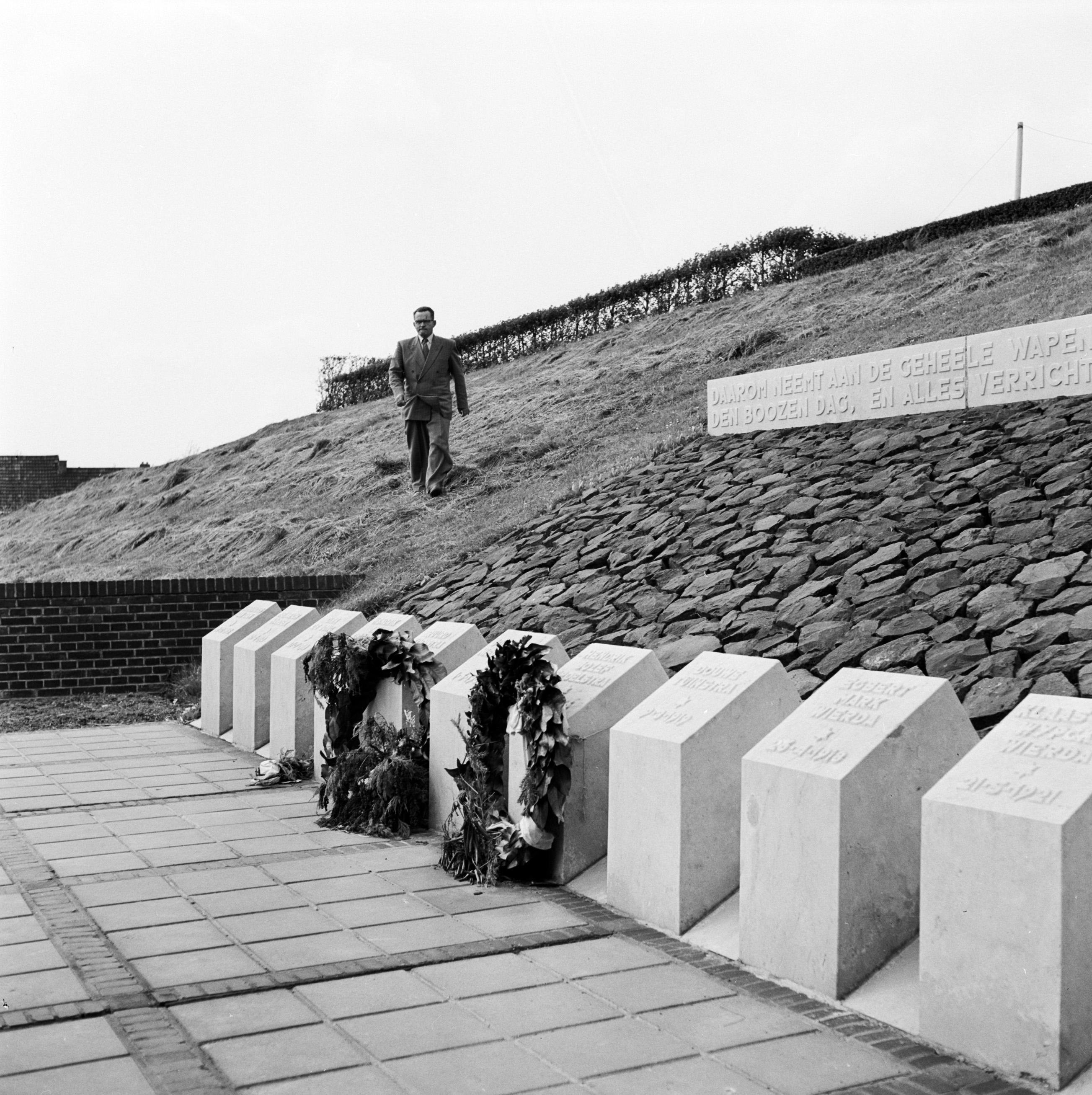 Collectie / Archief : Fotocollectie Van de Poll Reportage / Serie : [ onbekend ] Beschrijving : Ynse Postma bij het gedenkteken voor de fusillade van 11 april 1945 aan de voet van de dijk van het Van Harinxmakanaal bij Dronrijp. Bij het monument met de namen van de geëxecuteerden liggen twee kransen Annotatie : Gerard de Jong overleefde als enige een fusillade op 7 april 1945 bij Dronrijp. Ynse Postma verleende De Jong eerste hulp en hielp bij diens transport naar een onderduikadres Datum : 1955-00-01 Locatie : Dronrijp, Friesland, Van Harinxmakanaal Trefwoorden : EHBO, bezoekers, dijken, executies, gedenktekens, hulpverlening, kransleggingen, onderduikers Persoonsnaam : Postma, Ynse Fotograaf : Poll, Willem van de, [onbekend] Auteursrechthebbende : Nationaal Archief Materiaalsoort : Negatief (6x6) Nummer archiefinventaris : bekijk toegang 2.24.14.02 Bestanddeelnummer : 254-3342